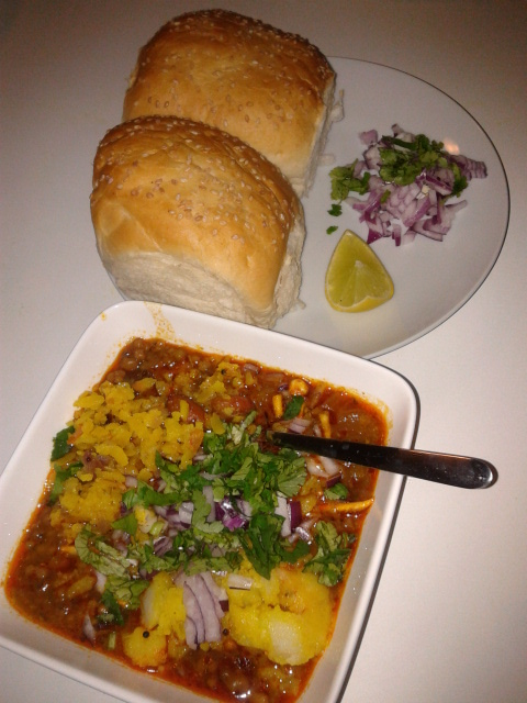 मिसळ पाव रस्सा